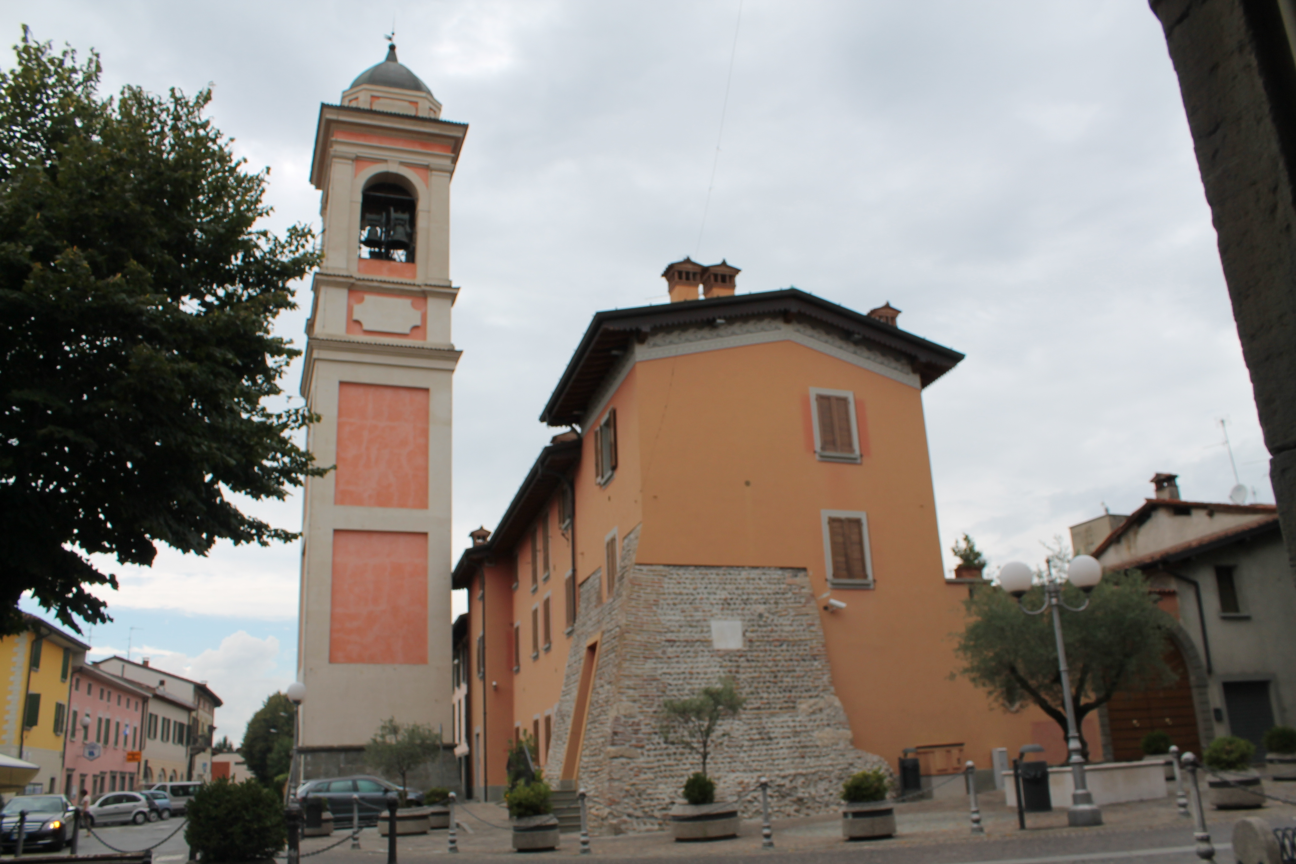 Resti dell'antico castello (o ricetto difensivo) presente a Castelcovati.